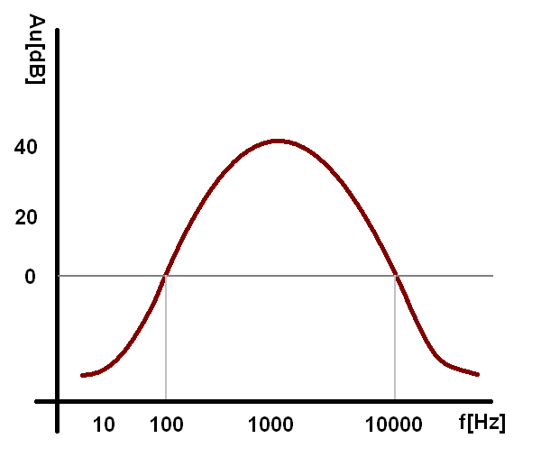 Pásmová propust. Propuštěny budou pouze frekvence mezi 100Hz a 10000Hz.